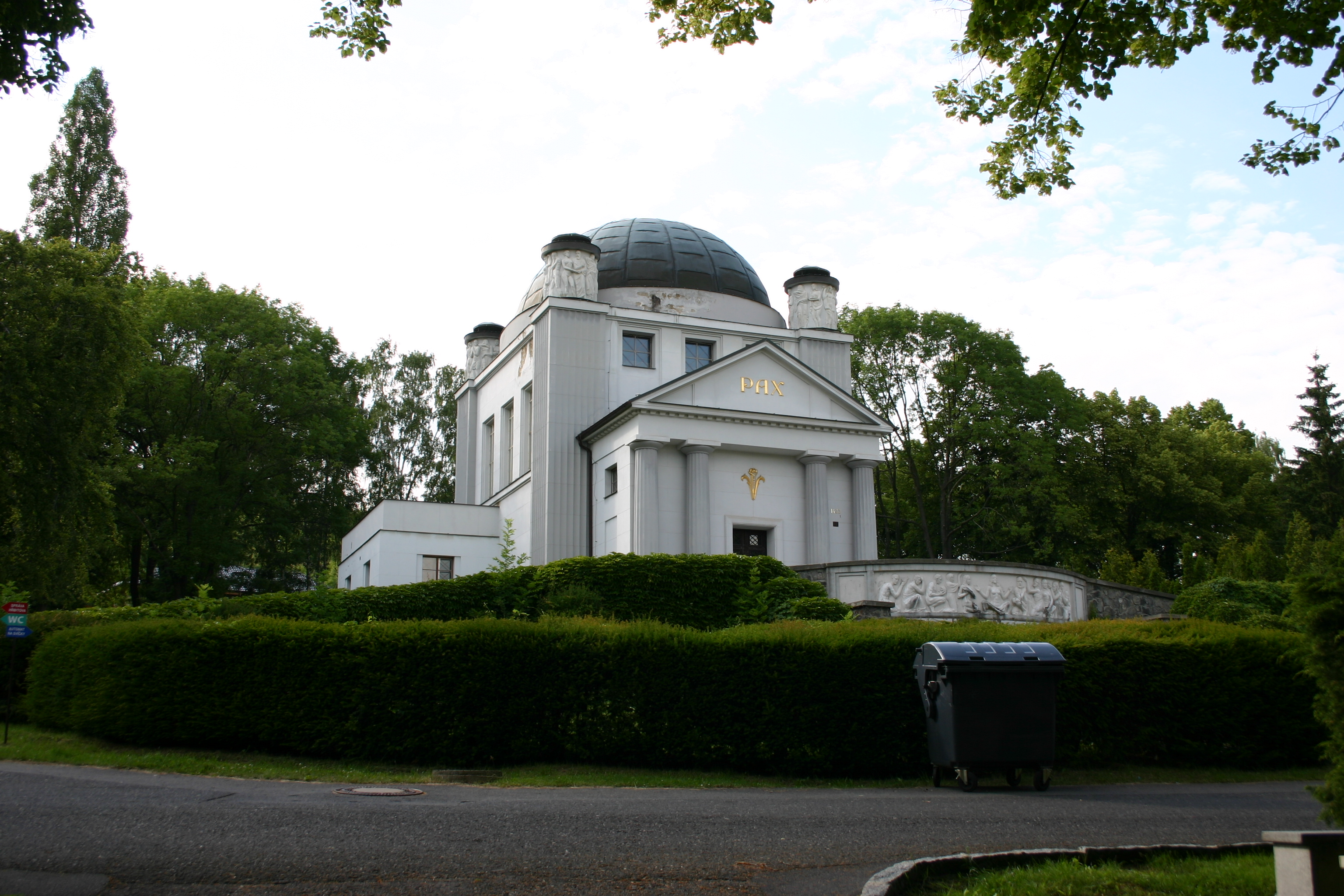 Krematorium v Mostě, dnes Památník obětem II. světové války v Mostě.